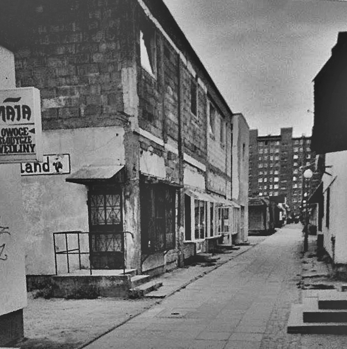 Rozbudowa Pasażu Baczyńskiego w Gorzowie Wielkopolskim, ok. 2000 r.